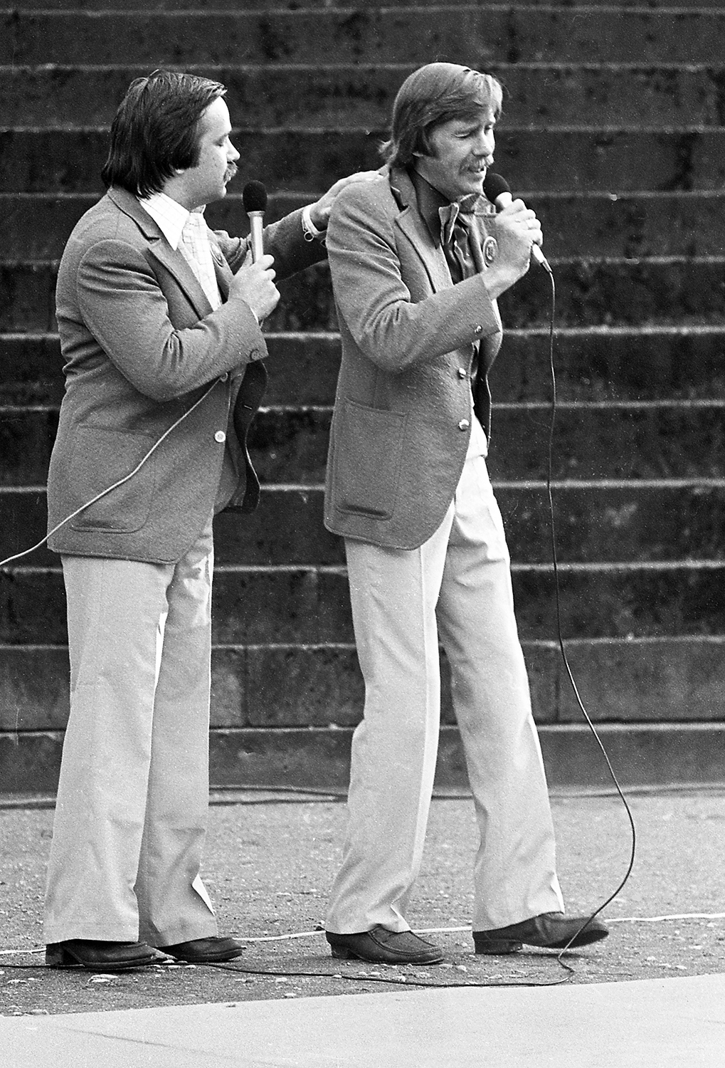 Priit Korts ja Lembit Sibul, näitlejad 74